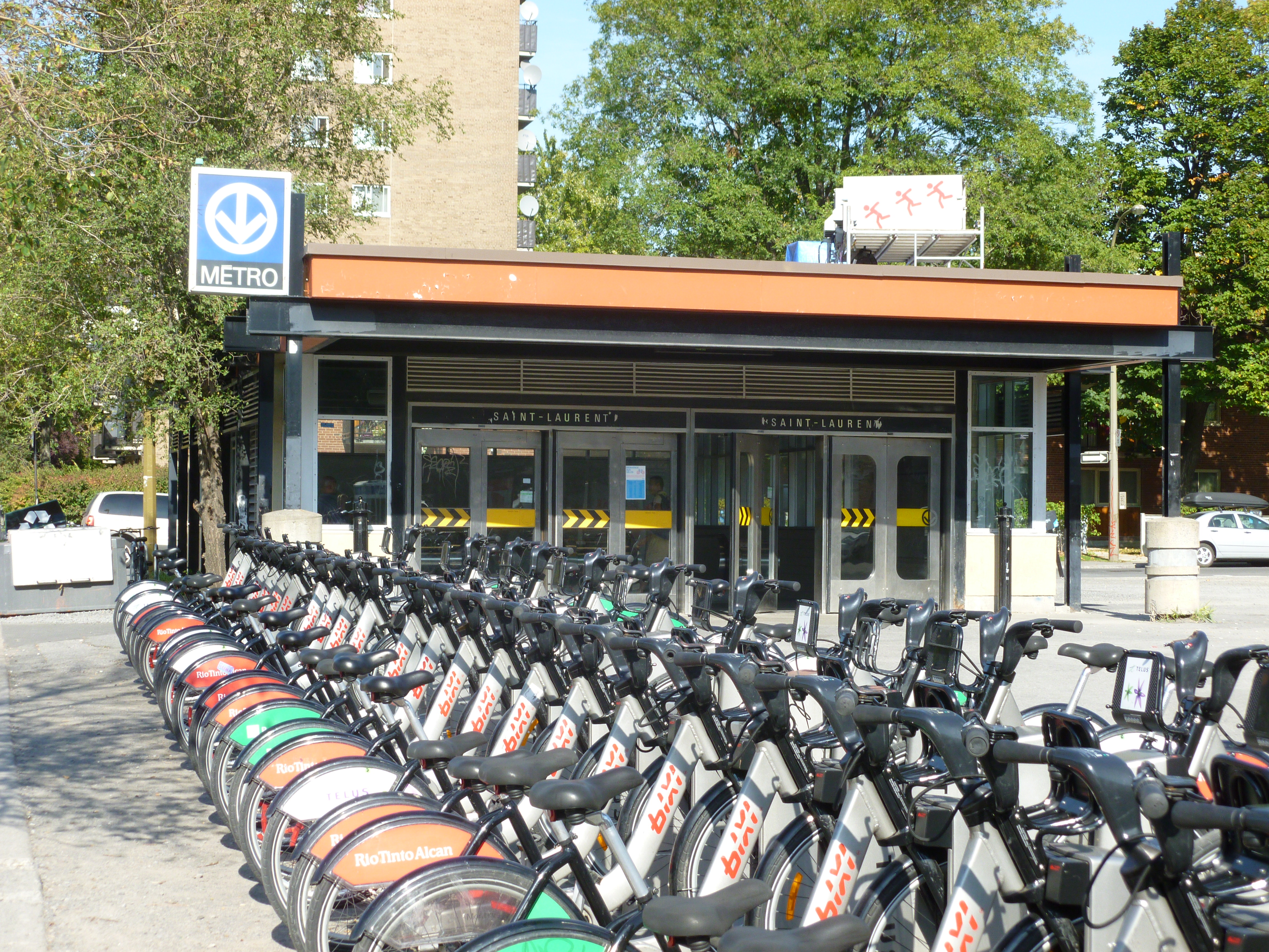 L'Édicule de la station de métro Saint-Laurent à Montréal, Québec, Canada